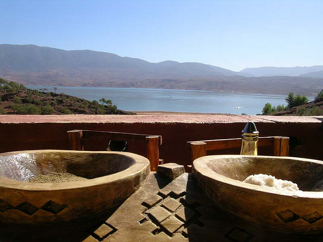 Morocco08